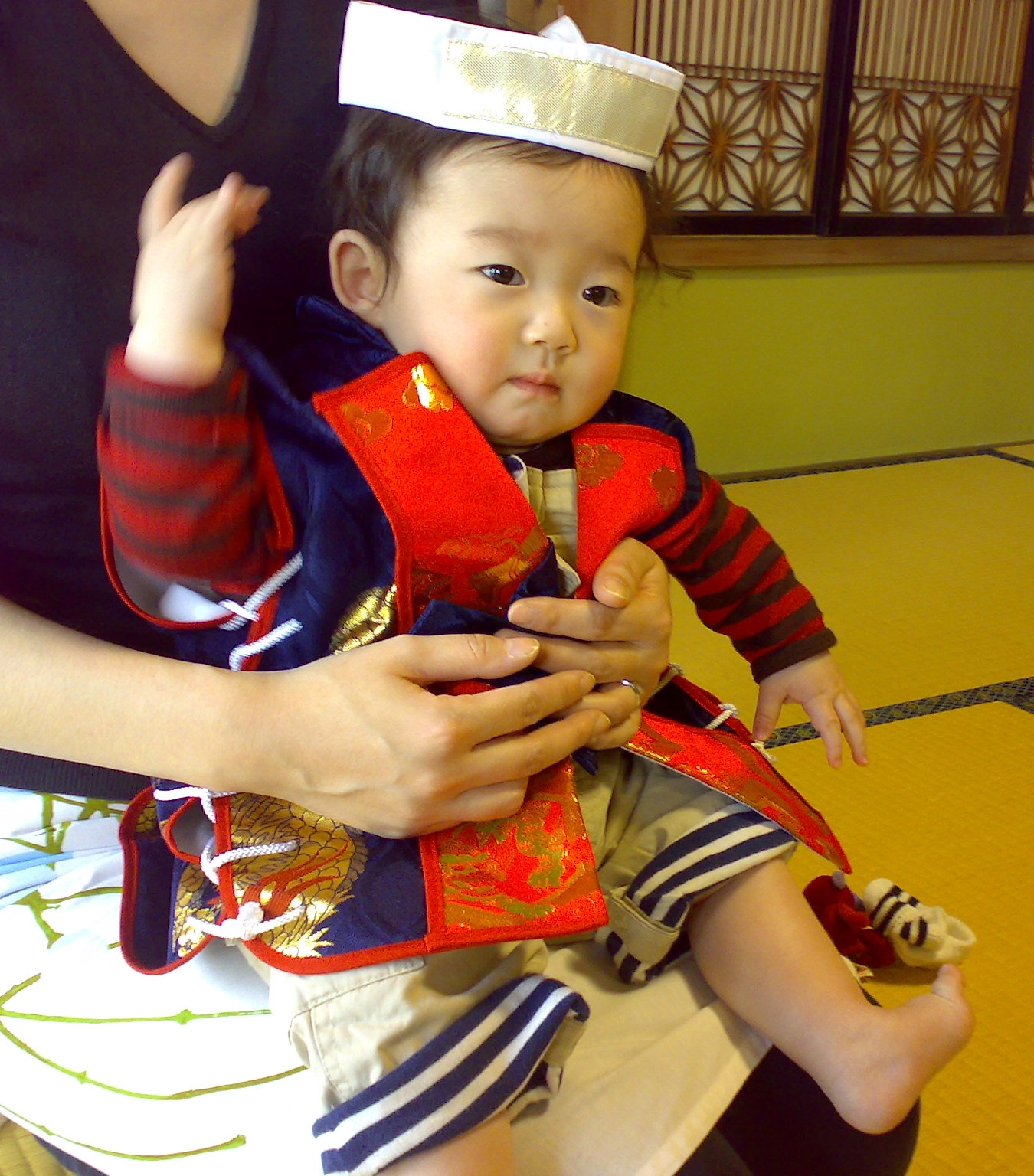 中文（香港）: 日本端午節穿著陣羽織的嬰兒